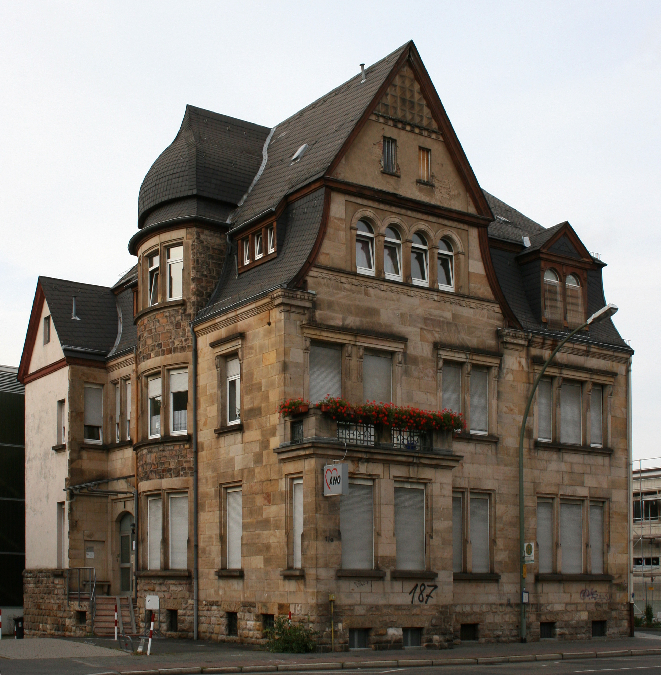 Eugen-Kaiser-Str. 17a in Hanau. Denkmalgeschütztes Gebäude (Architekt Georg Clormann 1908/10).